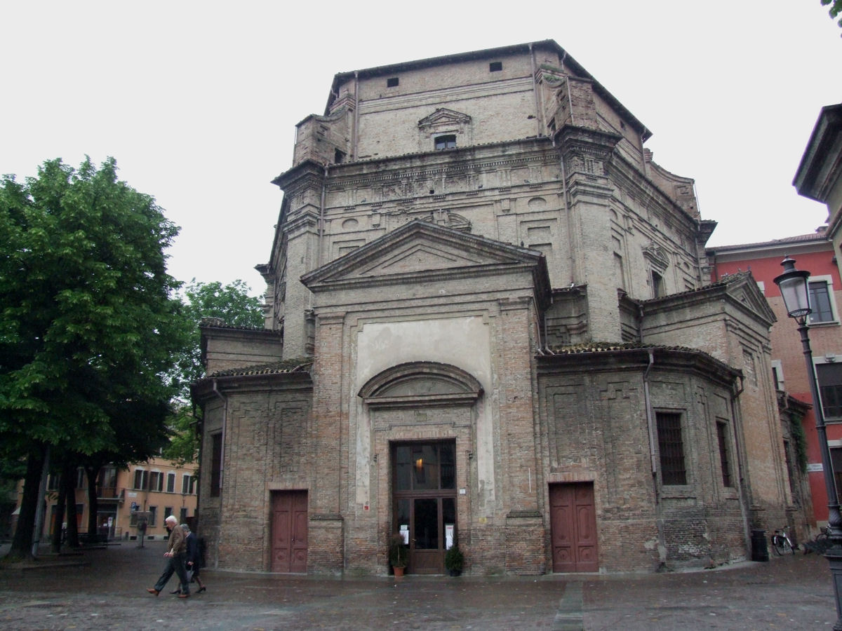 Chiesa di Santa Maria del Quartiere, Parma, Italy (Emilia Romagna)-Church of Santa Maria, Parma, Italy